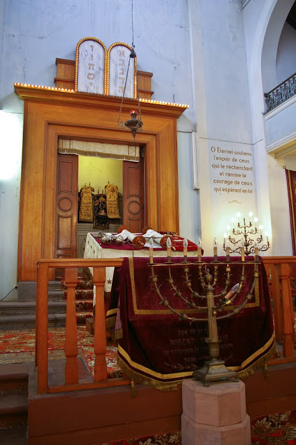 Arche Sainte et Teva de la Synagogue de Guebwiller